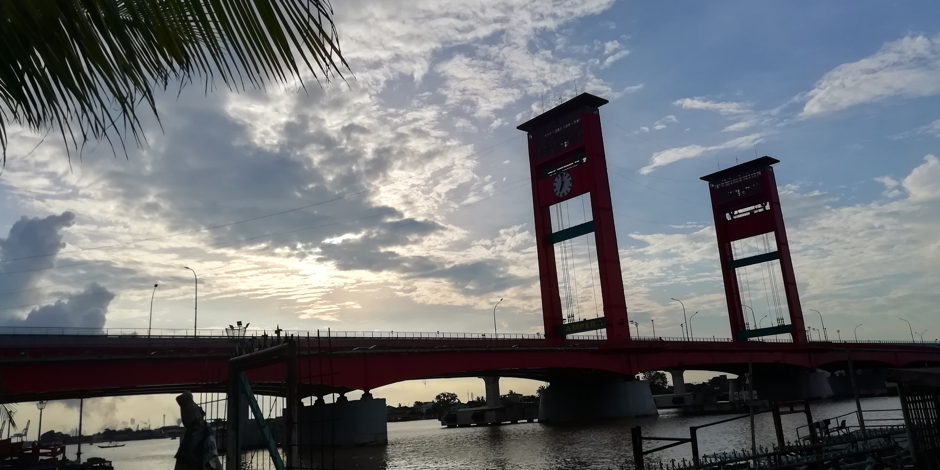 Jembatan Ampera (Amanat penderitaan rakyat) adalah sebuah jembatan di Kota Palembang, Provinsi Sumatra Selatan, Indonesia. Jembatan Ampera, yang telah menjadi semacam lambang kota, terletak di tengah-tengah kota Palembang, menghubungkan daerah Seberang Ulu dan Seberang Ilir yang dipisahkan oleh Sungai Musi.